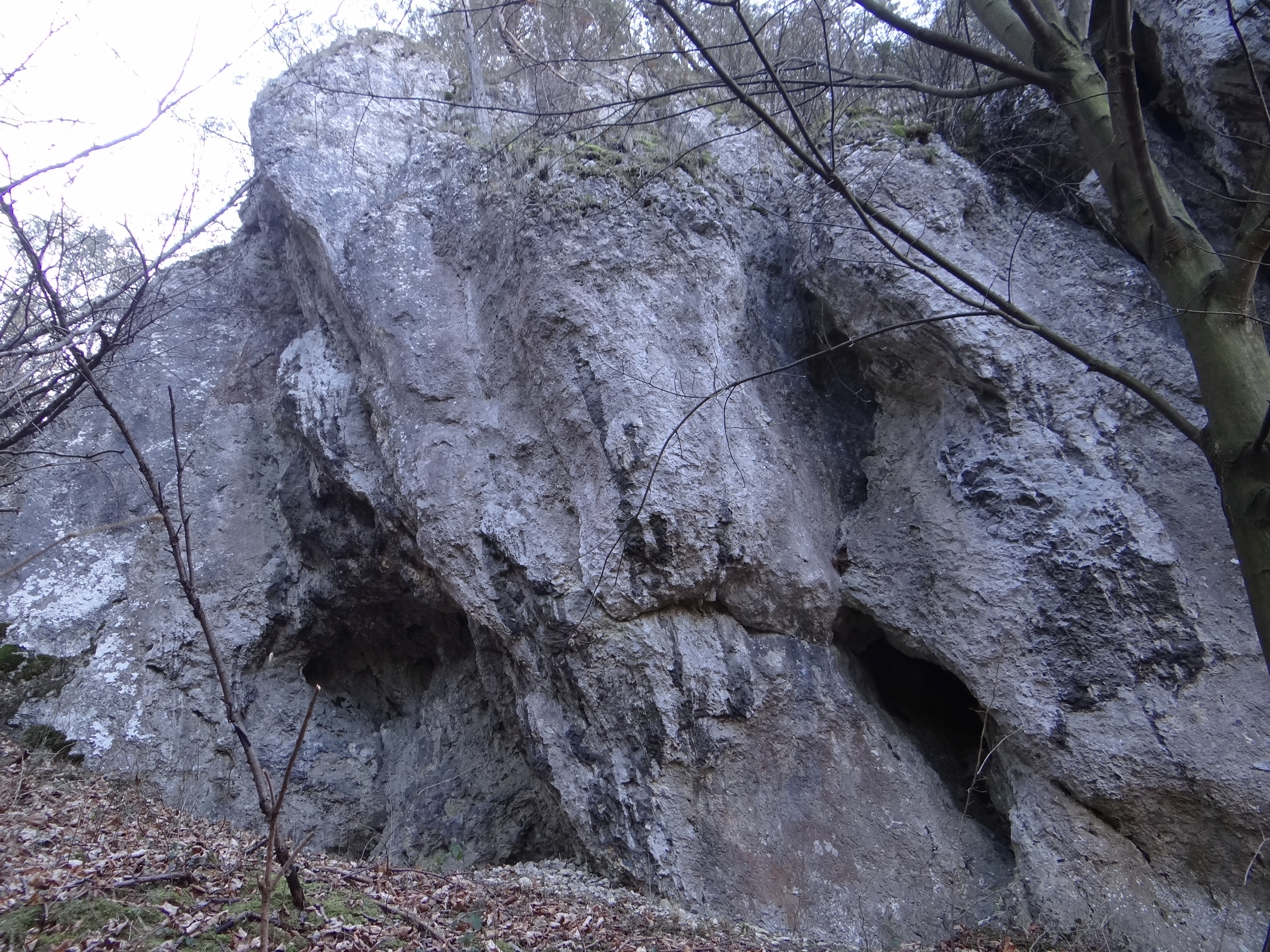 Mur pod Okrętem w Dolinie Kobylańskiej